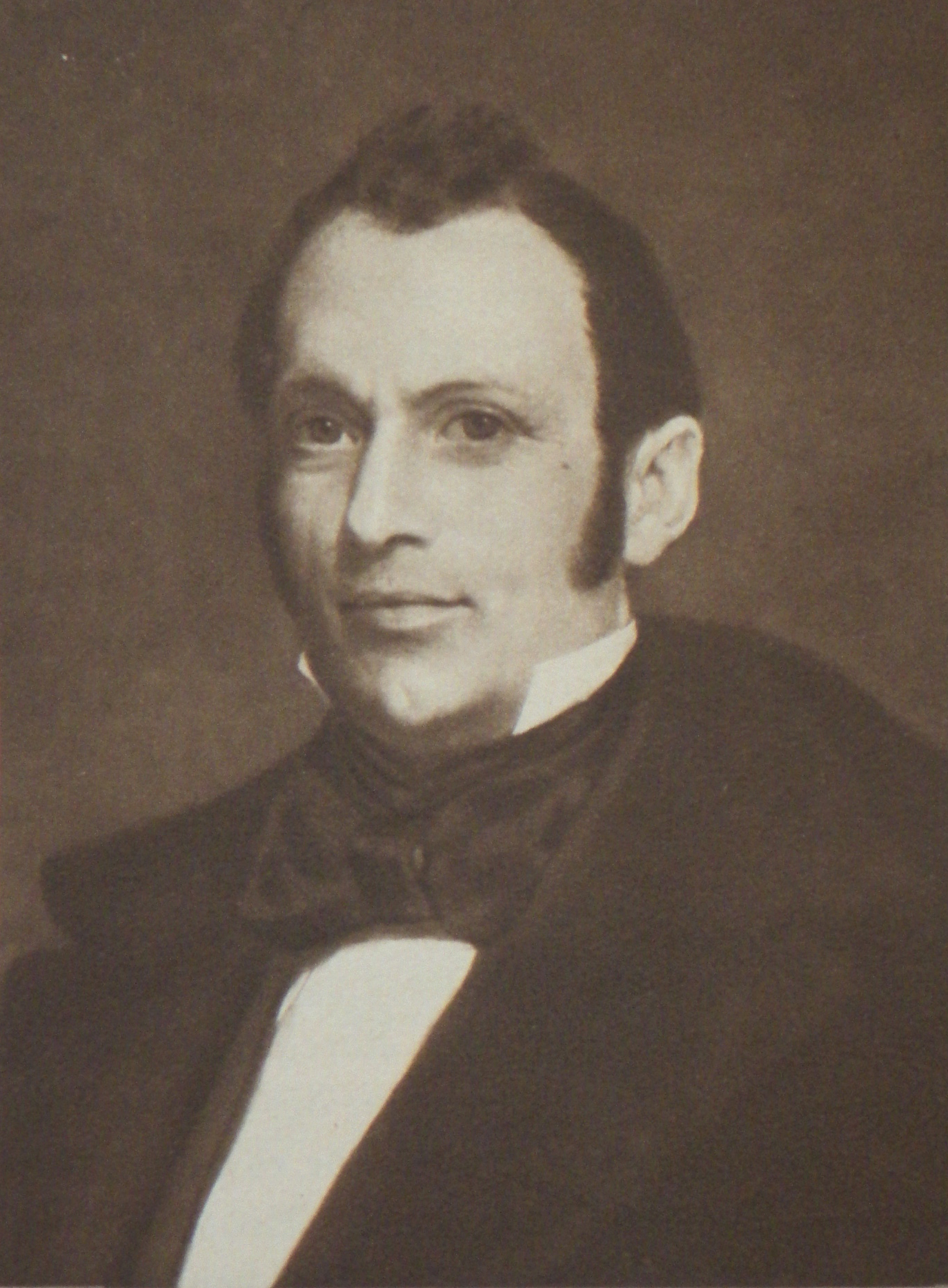 Porträt von Just Friedrich Güntz